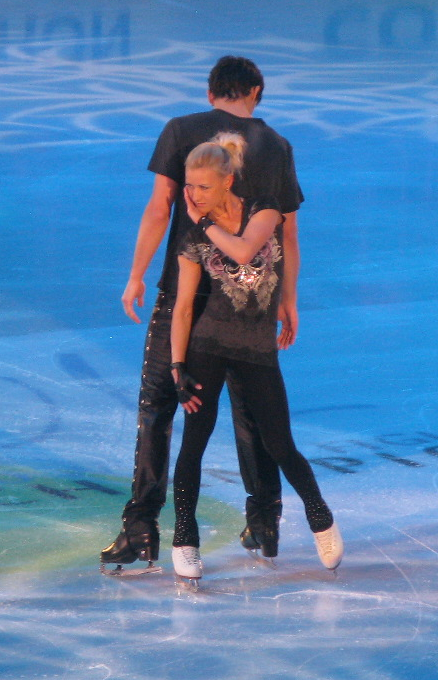 Tatiana Volosozhar et Maxim Trankov au gala des Championnats du monde de patinage artistique 2012 à Nice.